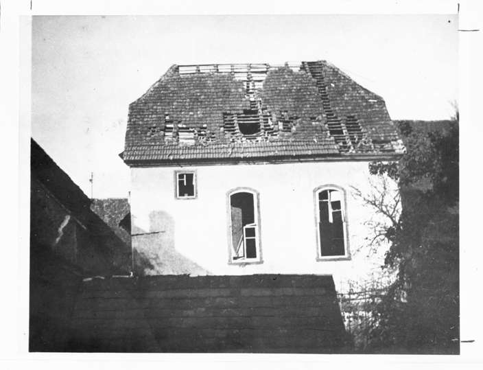 Synagoge (Ittlingen) Nutzungsbedingungen ausdrücklich auch für Wikipedia (siehe: [1]